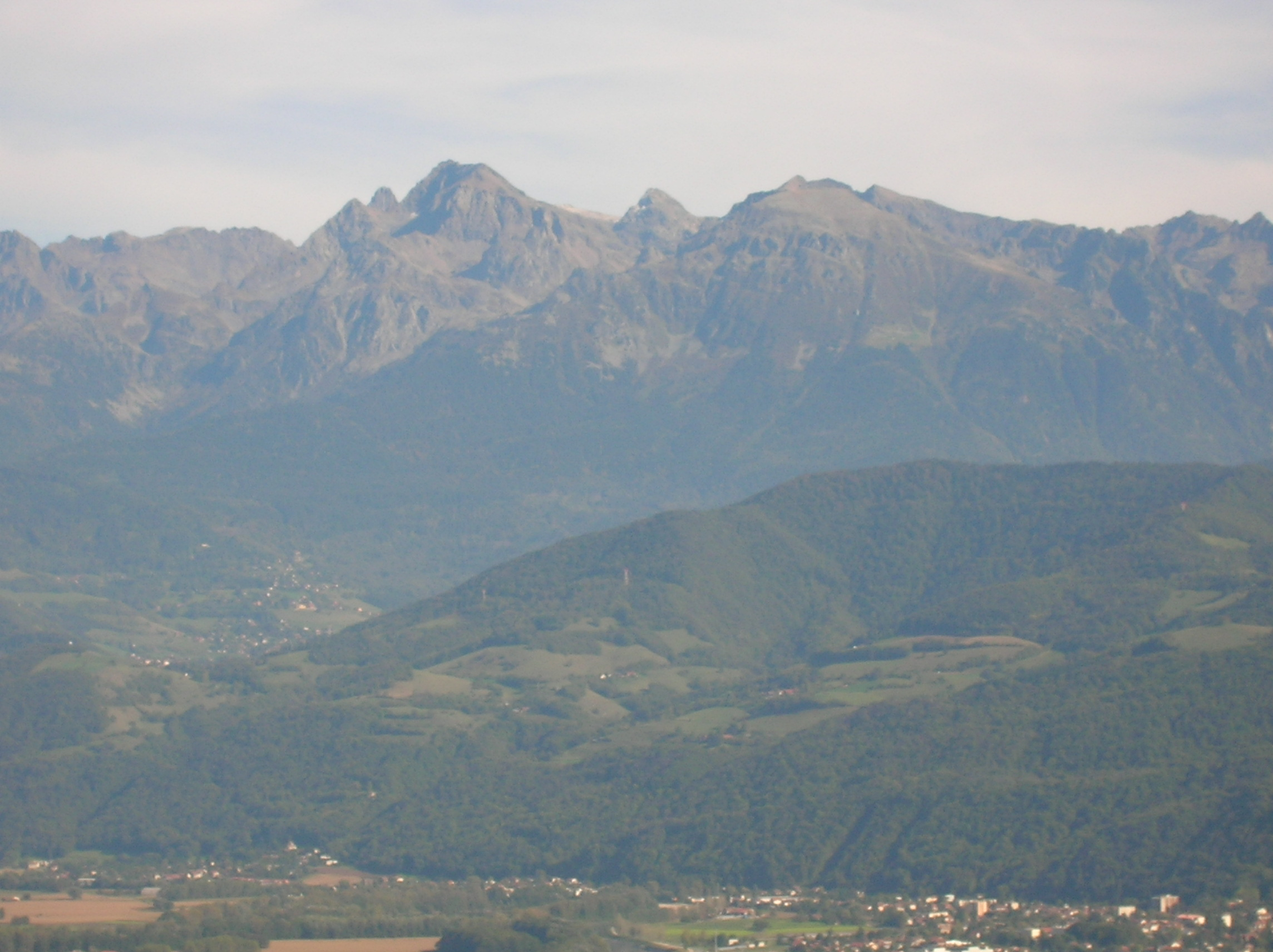 Grande Lance de Domène et Grand Domenon dans la chaine de Belledonne. Vue de la petite ville de Domène dans la vallée du Grésivaudan, près de Grenoble